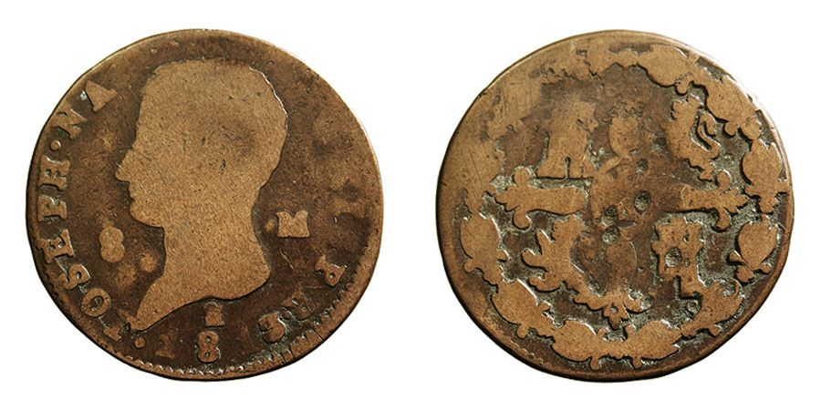 Moneda de vuit morabatins encunyada a Segòvia en el regnat de Josep I (1813). Feta en coure.